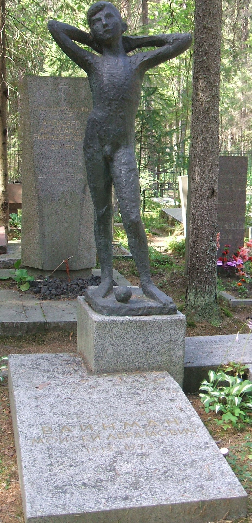 Комаровское кладбище Деятели искусства и науки